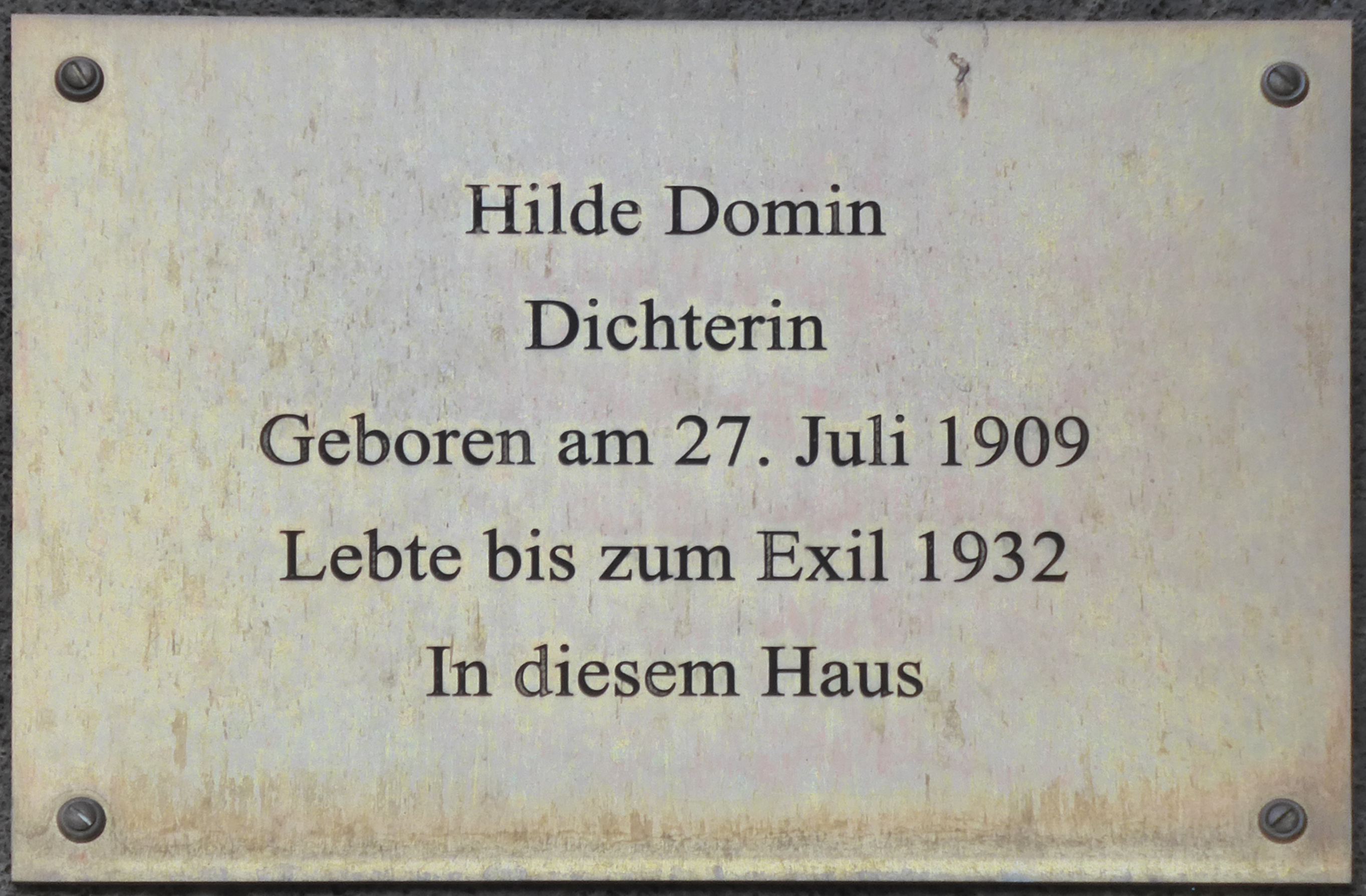 Stolpersteinverlegung Riehler Straße 23 am 4. April 2017, Köln.